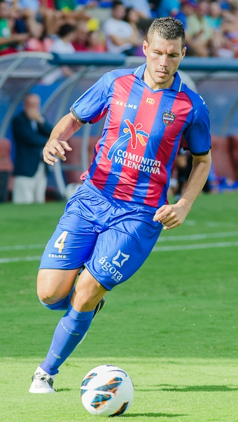 El jugador granota David Navarro